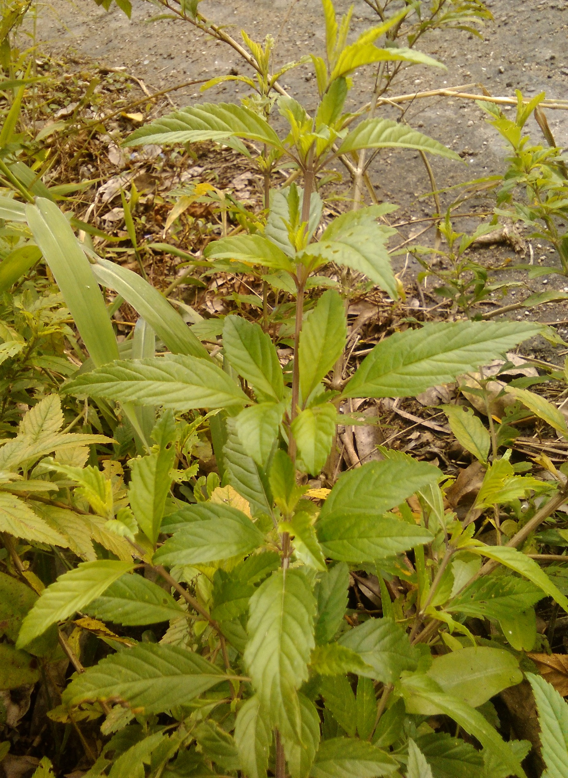 Hierba encontrada silvestremente en Paraíso, Tabasco